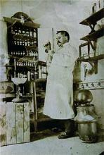 El creador de Ceregumil en su Farmacia